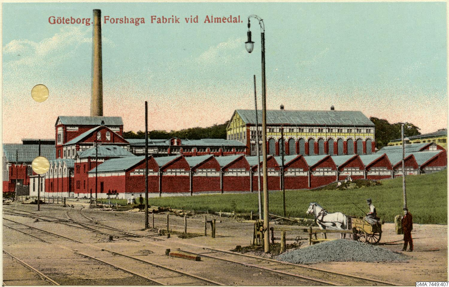 Forshagas fabrik i Almedal, Skår i Göteborg. GMA:7449:407